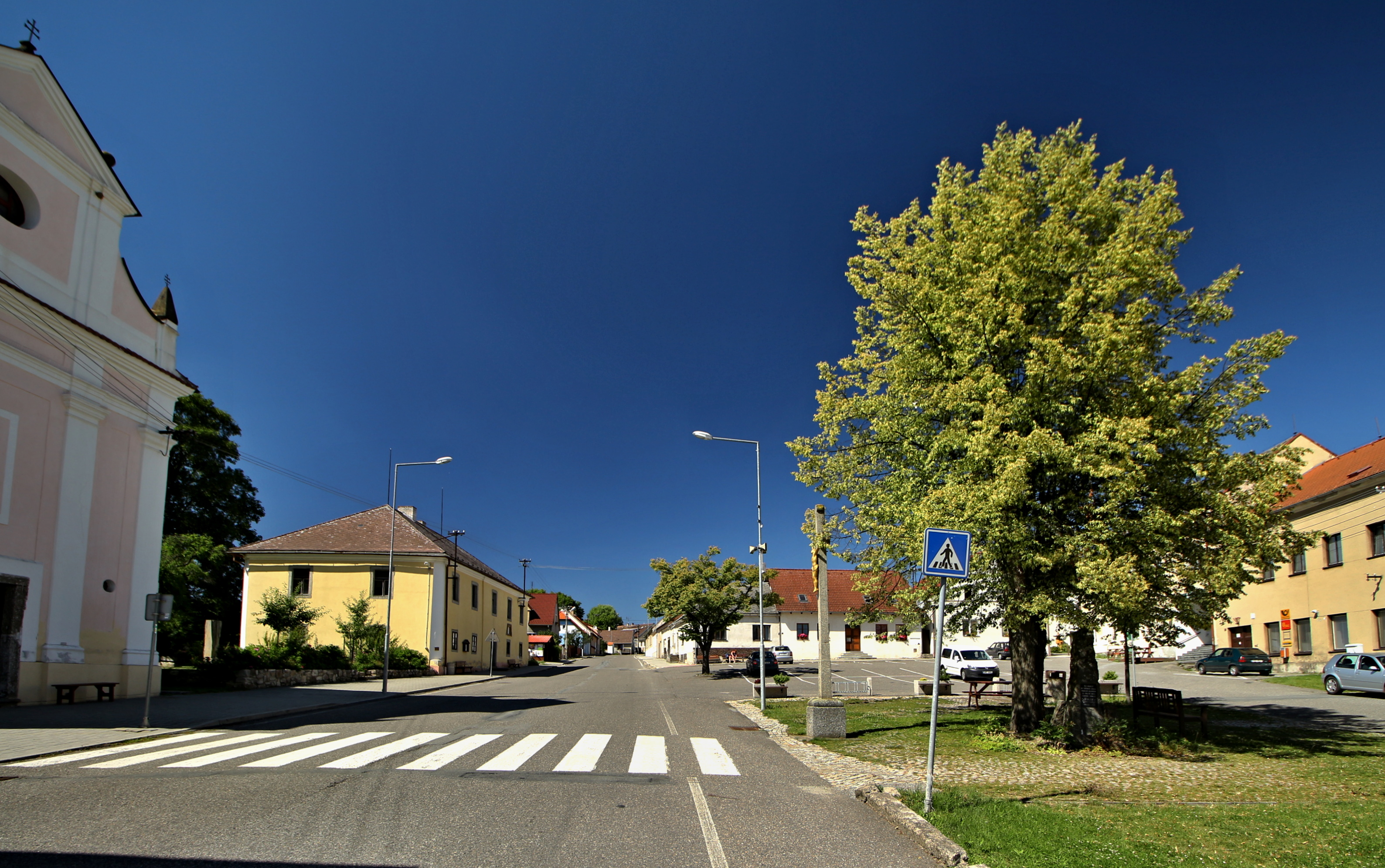 Nadějkov náměstí